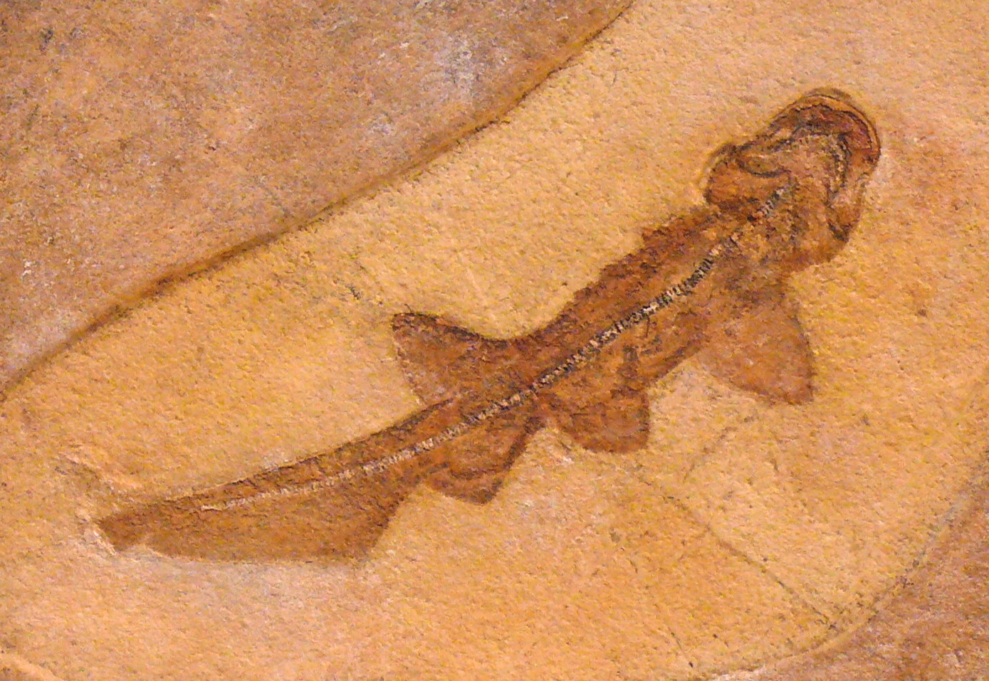 Paraorthacodus sp. from Eichstätt, Germany